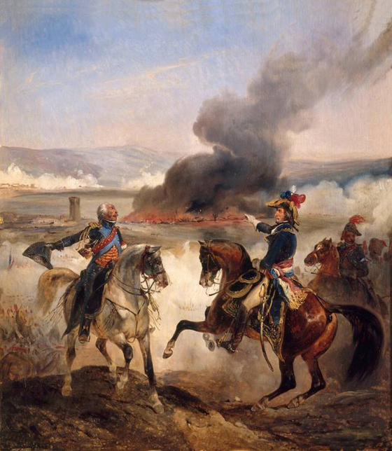 Bataille d'Anghiari, le général Auguereau donne ses ordres